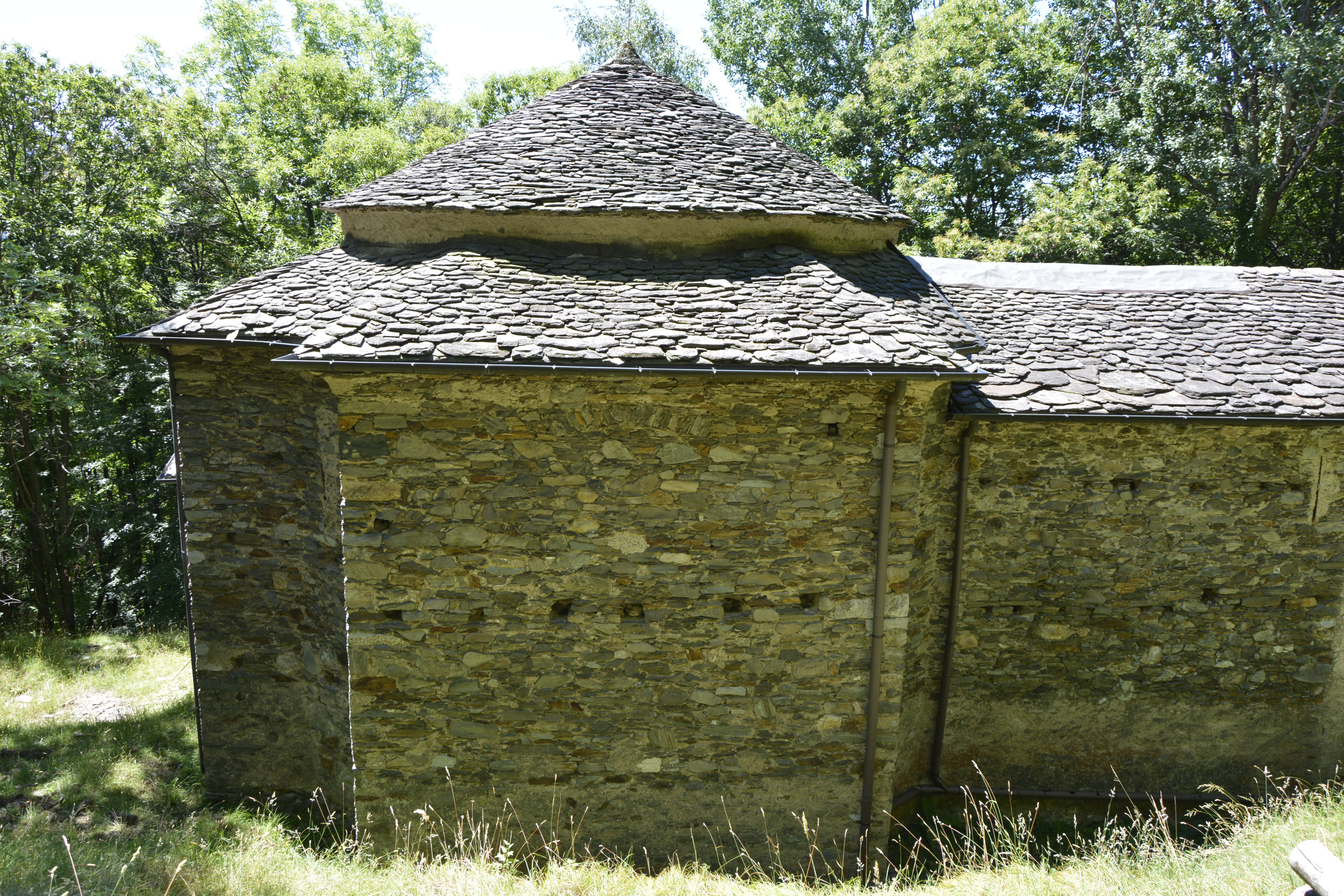 La chiesa di San Giuseppe, o santuario di Penedegra, a Graglio, nel comune di Maccagno con Pino e Veddasca, in provincia di Varese.